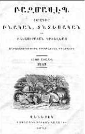 Арменистический журнал "Базмавеп"